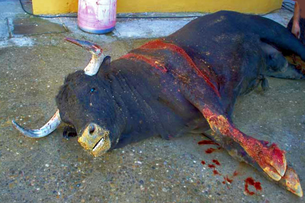 Toro muerto después de una corrida. Antes de la enfermedad de las vacas locas, la carne se vendía en las carnicerías especializadas.